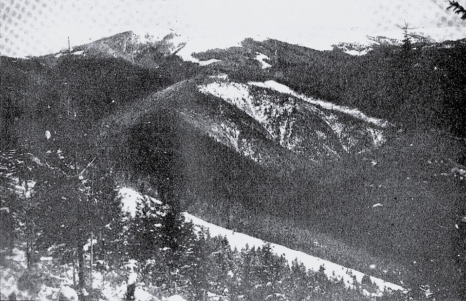 Blick vom Watonarka auf den Ludowa